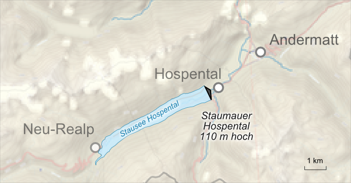 Lagekarte des Vorprojektes eines Stausees oberhalb von Hospental. Das Projekt wurde von den SBB in den Jahren 1931/32 ausgearbeitet, aber wegen geologischen Problemen nicht weiter verfolgt.